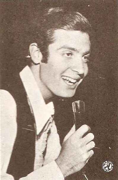 גדעון גרייף הוא היסטוריון העוסק בתחום חקר השואה וזמר ישראלי תמונה שהופיעה על עטיפת דיסק